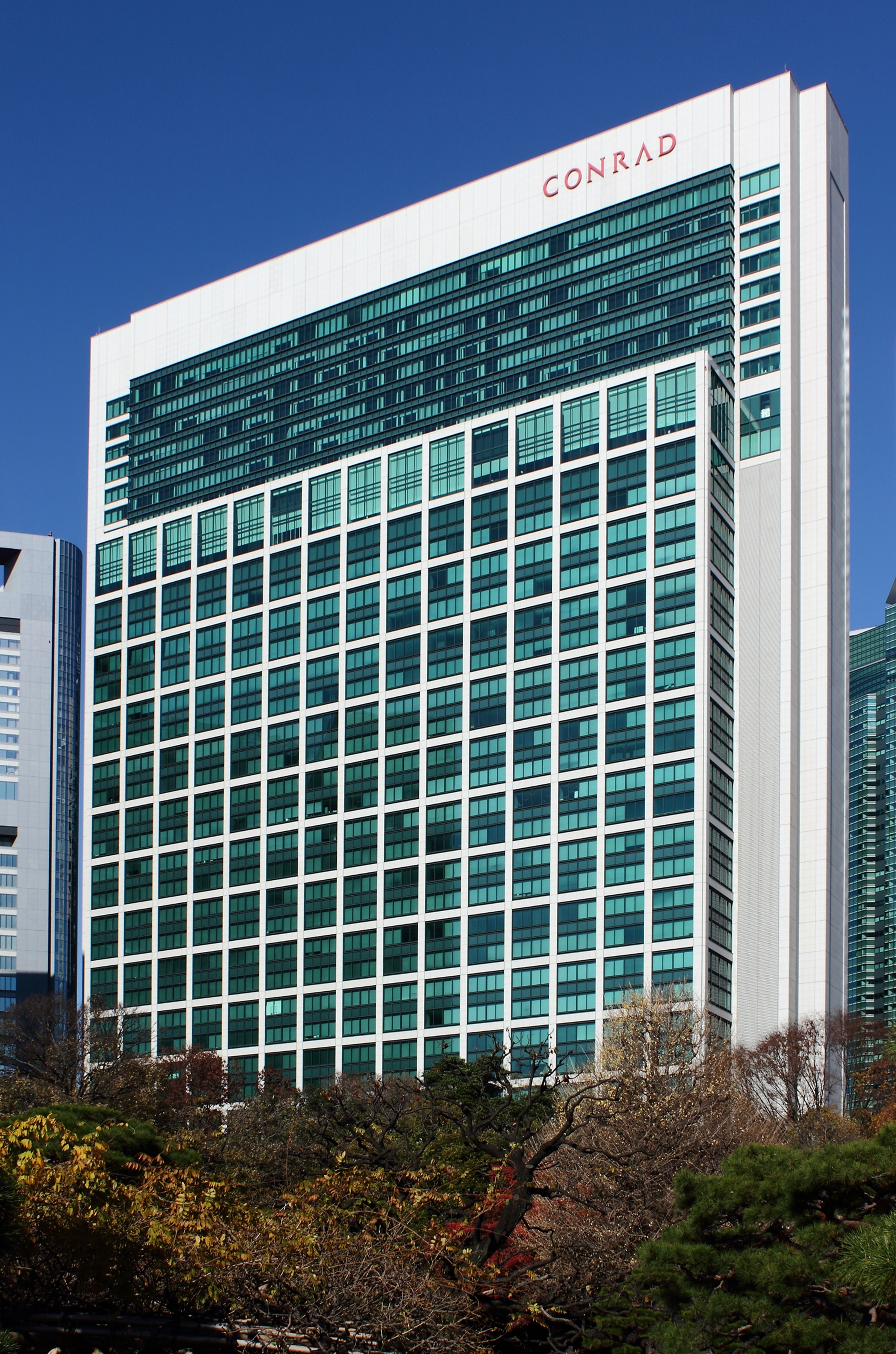 東京汐留ビルディング・コンラッド東京